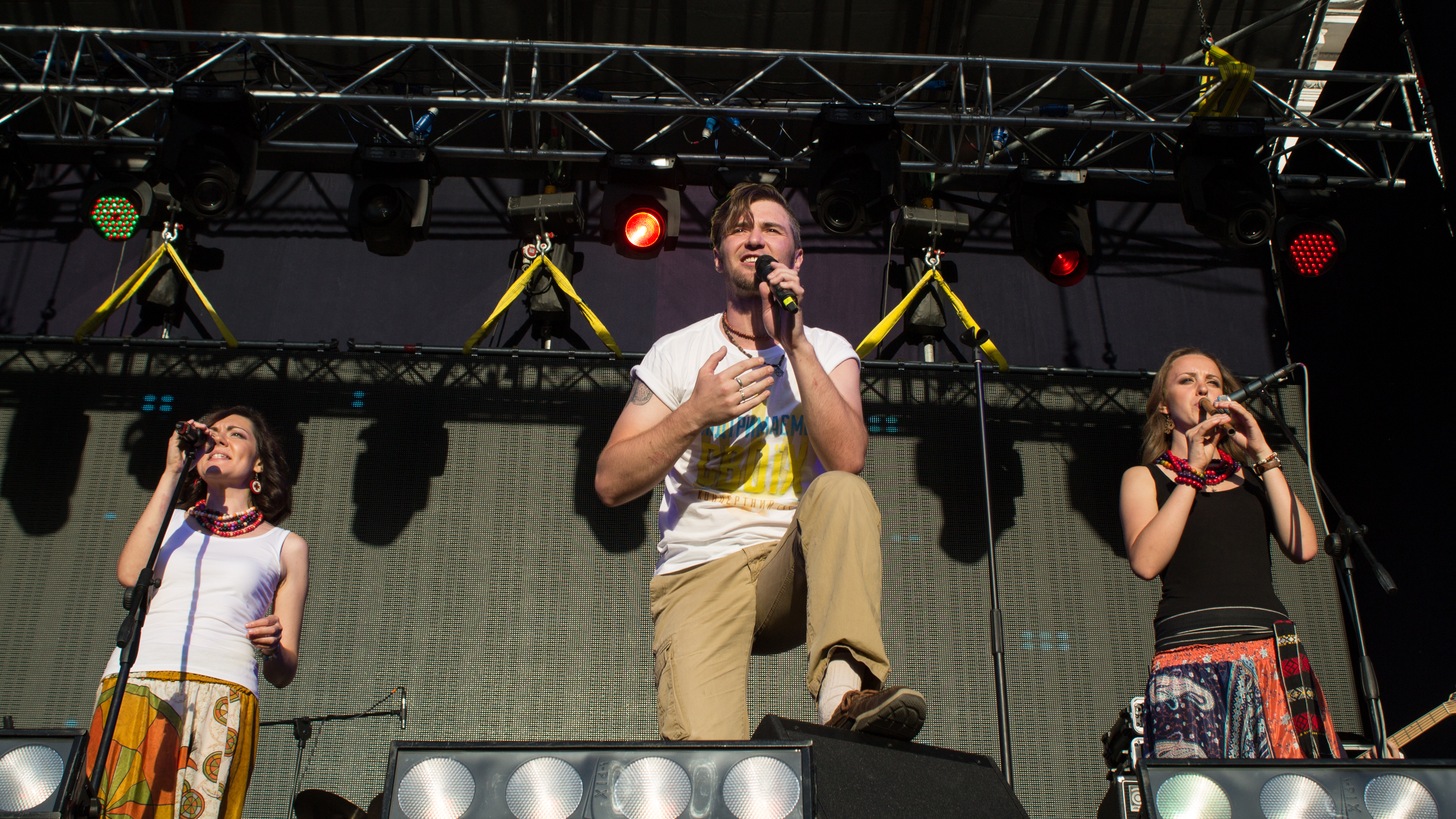 Виступ гурту "ТаРута" у Маріуполі